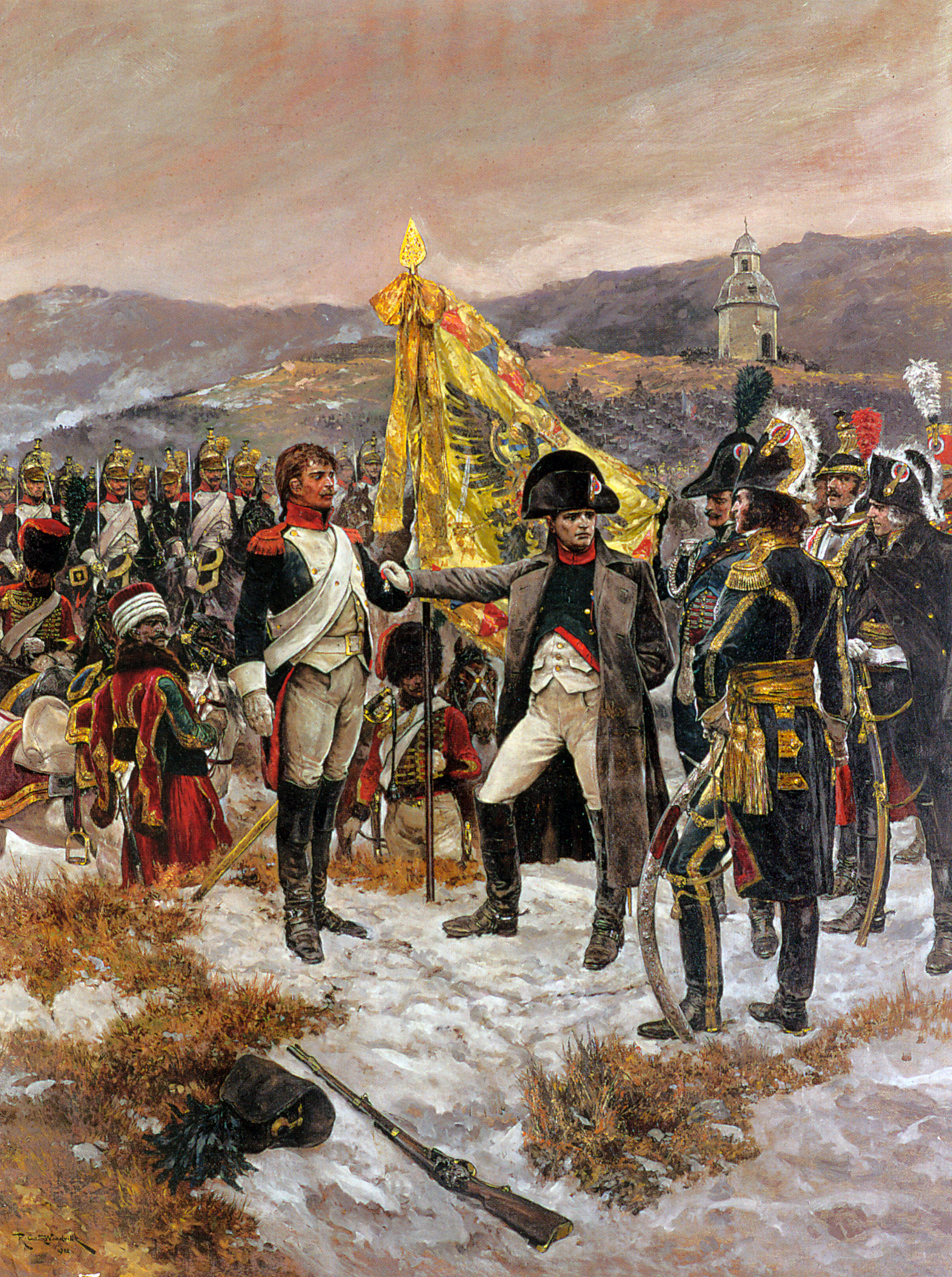 Napoleon na břehu potoka Litavy uděluje vyznamenání vojákovi za statečnost projevenou v bitvě u Slavkova. Croix d'Honneur